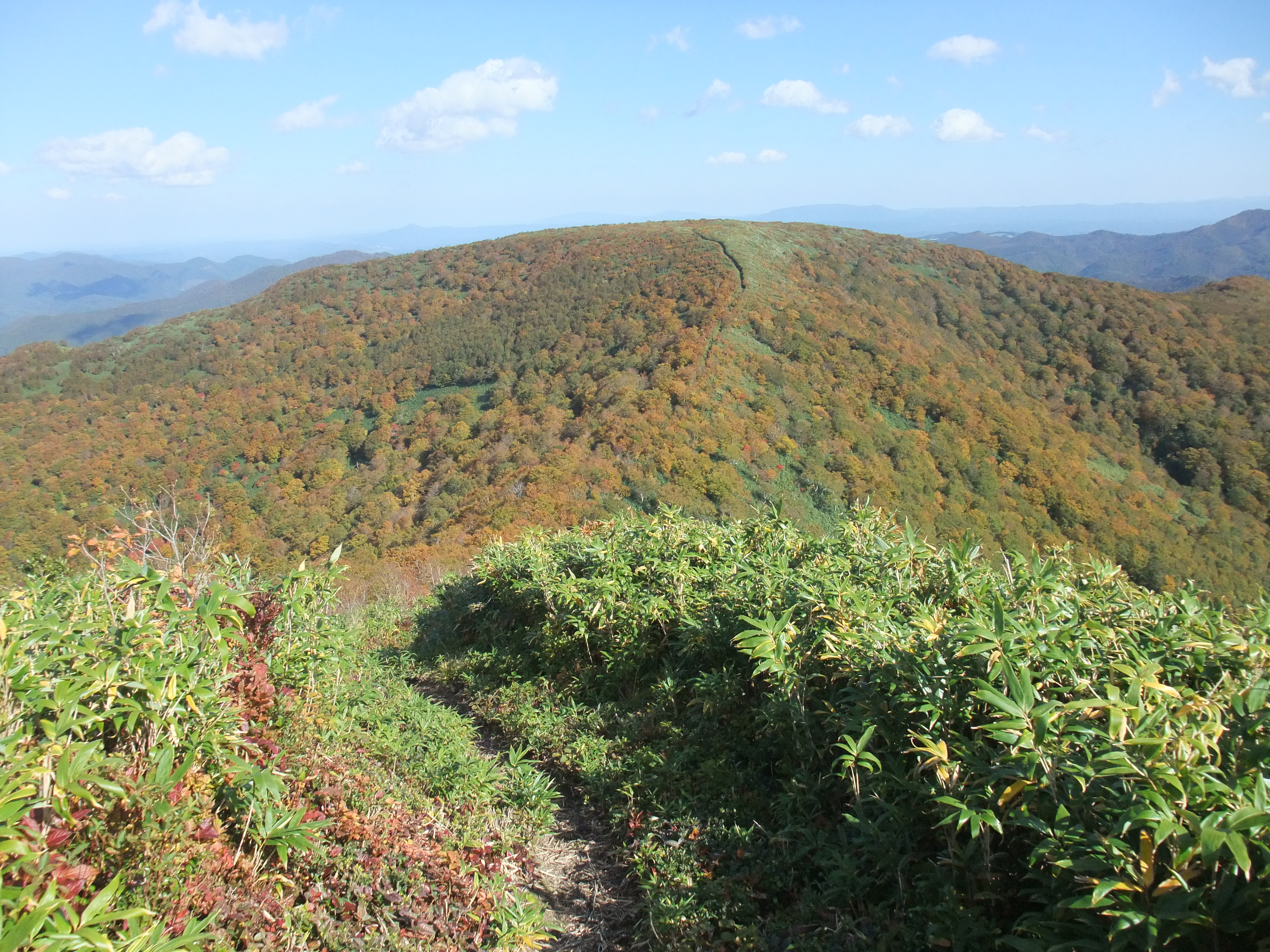 中岳から望む四角岳